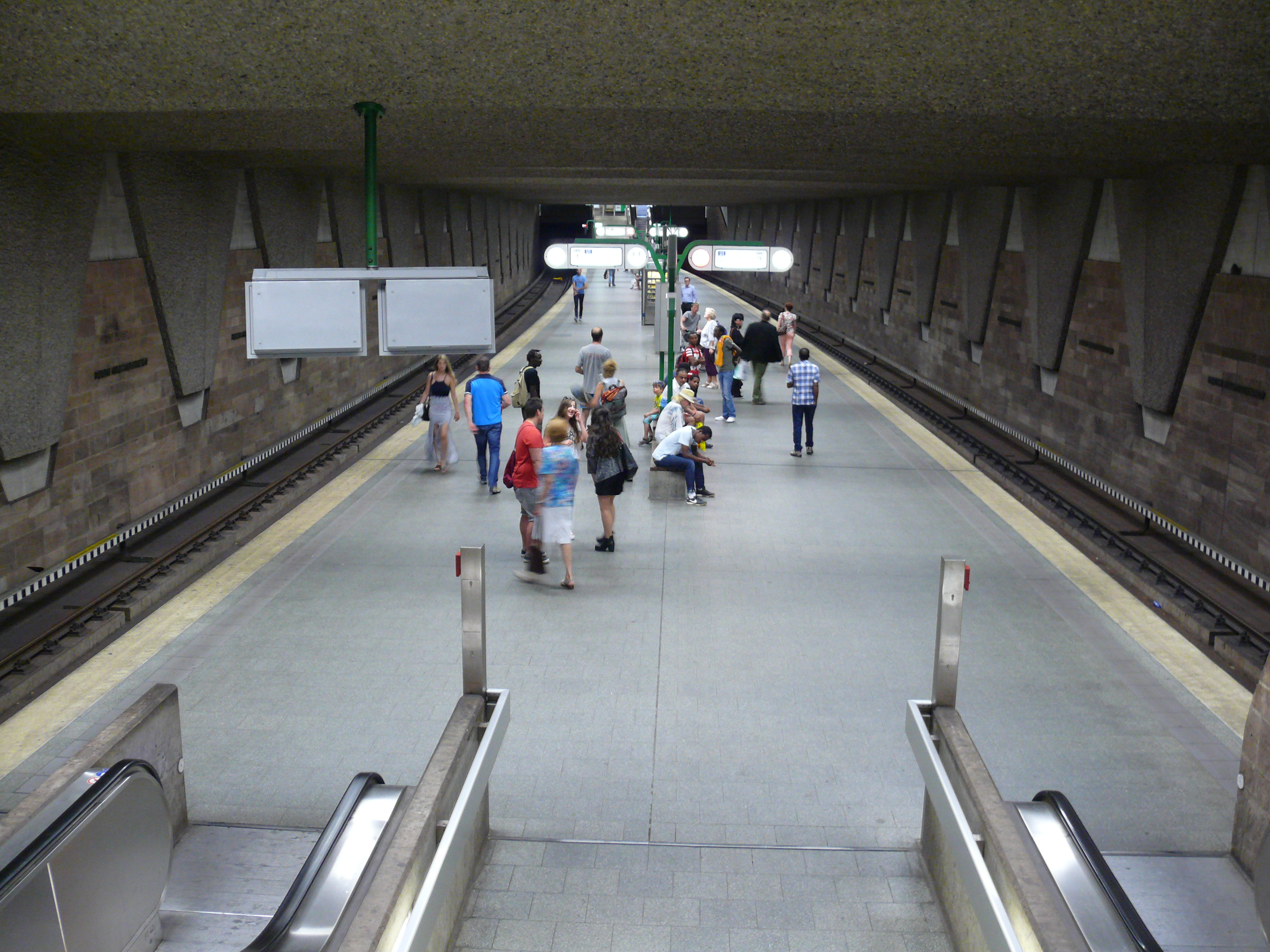 Blick auf die Bahnsteigebene am U-Bahnhof Hauptbahnhof in Fürth.